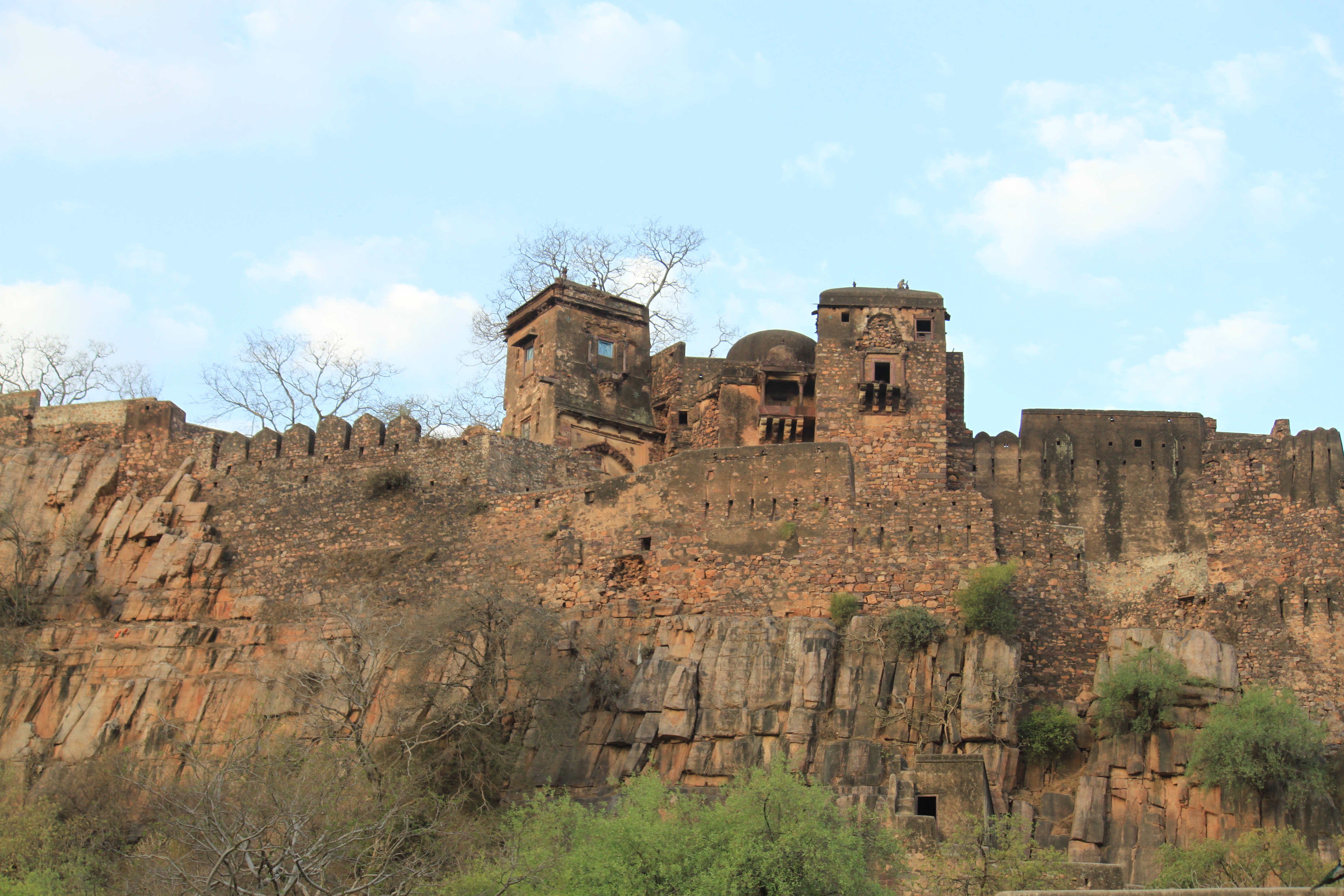 Parque nacional Ranthambore. Rajasthan